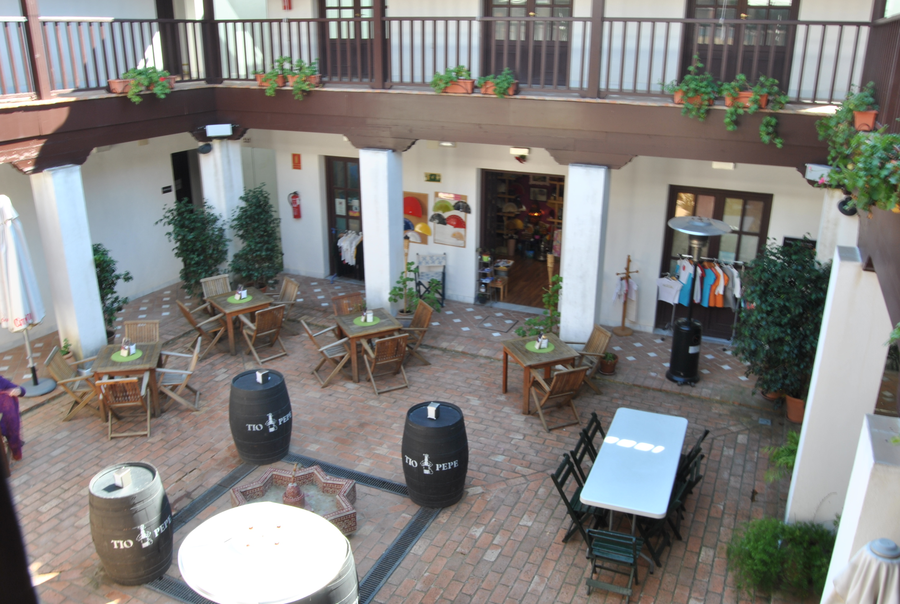 Patio Zoco Artesanía Unknown